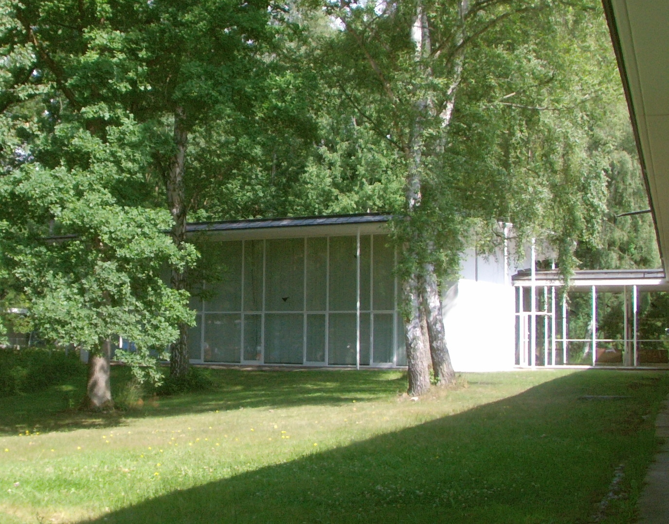 Ansicht der Aula